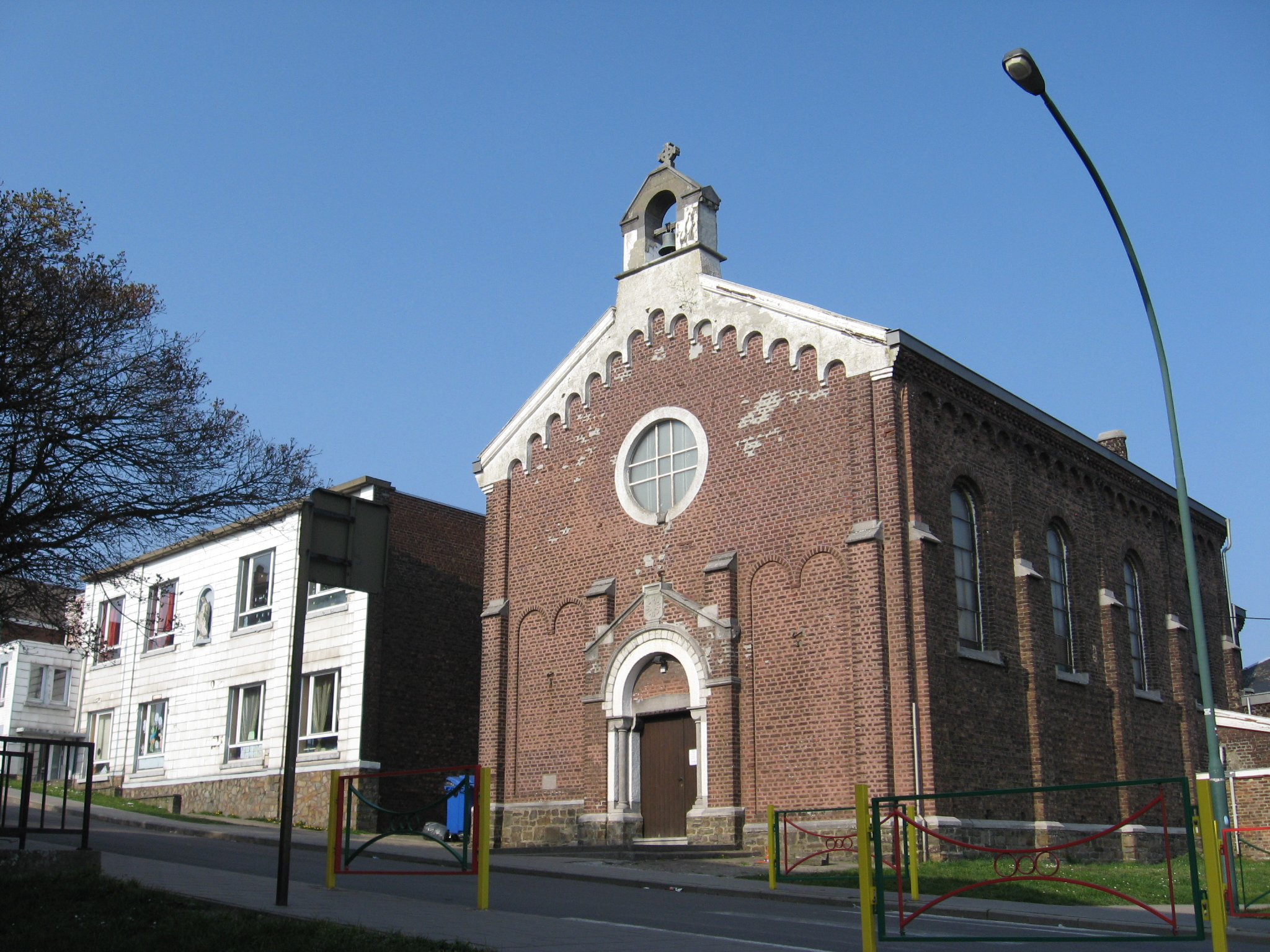 Onze-Lieve-Vrouw-van-Lourdeskerk te Jemeppe-sur-Meuse, Seraing